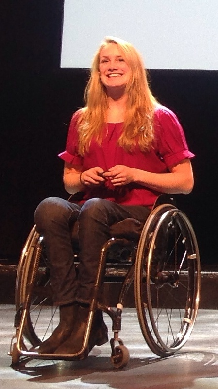 IA-konferansen 2013